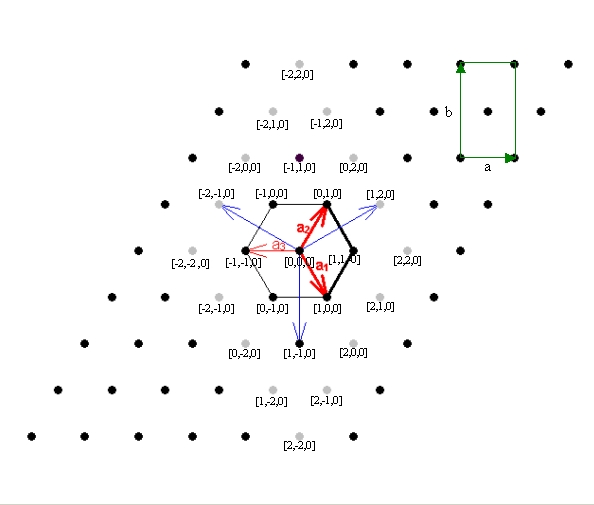 Hexagonale Elementarzelle Punkte: Gitterpunkte des hexagonalen Achsensystems in der (h,k,0)-Ebene zum Teil mit Koordinaten [h,k,0]. Graue Punkte: Punkte mit einem Index ± 2. Fette Striche: die Grundfläche der hexagonalen Elementarzelle. Schwarze Striche: die Grundfläche des 6-eckigen Prismas, das oft zur Veranschaulichung des hexagonalen Gitter-Systems verwendet wird. Rote Pfeile: Die Gittervektoren des hexagonalen Gitters. Dünn: der in der Mineralogie übliche 3. Gittervektor in der (hk0)-Ebene. Blaue Pfeile: Blickrichtung des 3. Raumgruppensymbols nach International Tables for Crystallography 3. Auflage. Grün: Grundfläche der orthohexagonalen Zelle. Grüne Pfeile: Gittervektoren der orthohexagonalen Zelle. (Der 3. Gittervektor ist der hexagonale c-Vektor)